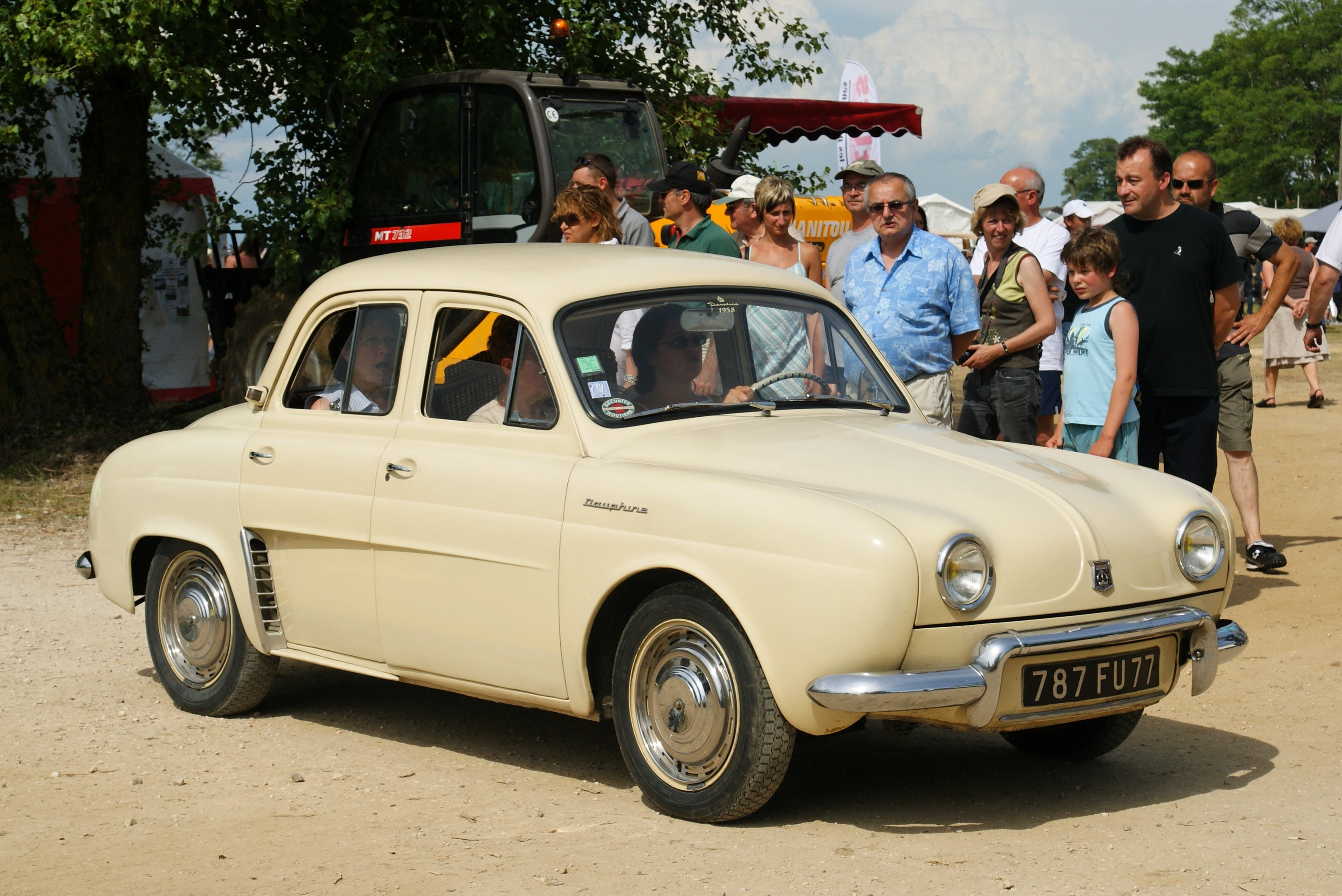 Une dauphine vue à La Locomotion en fêtes.